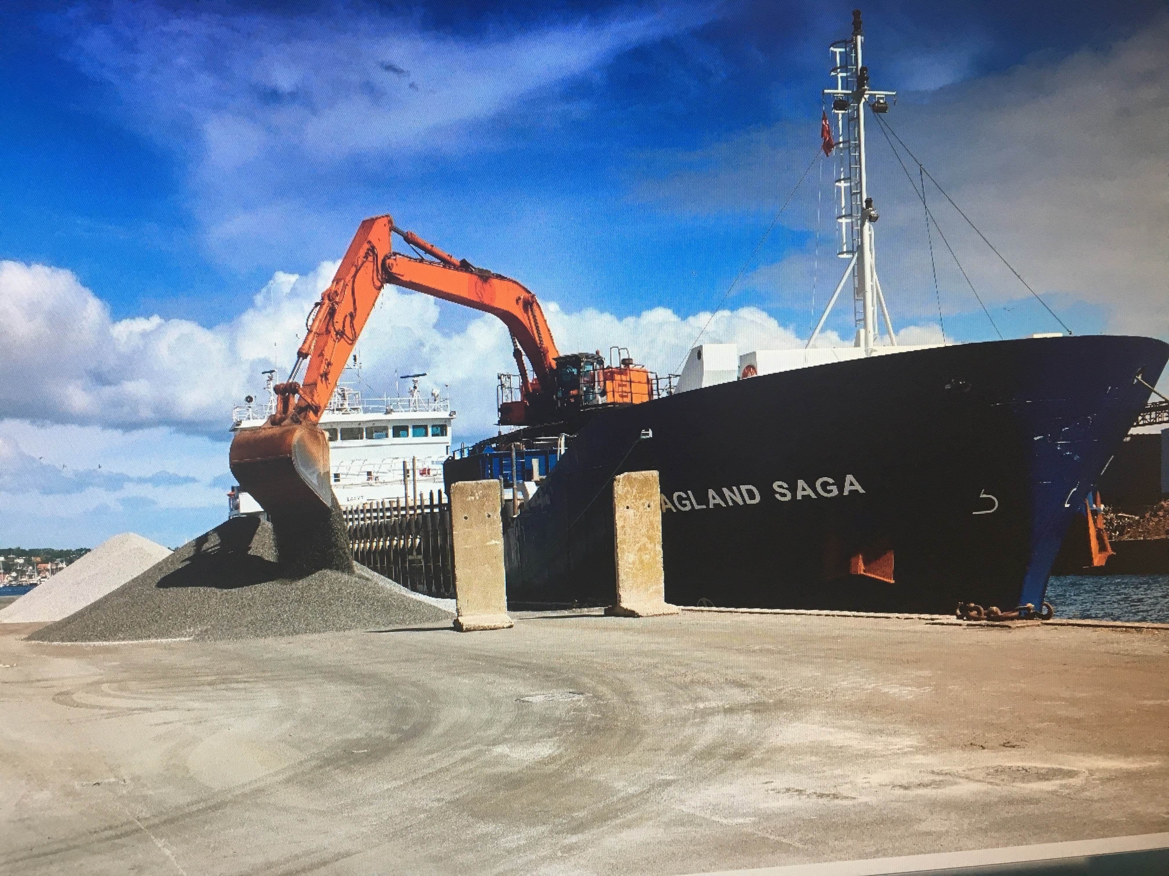 Losning af skærver, Kolding Havn